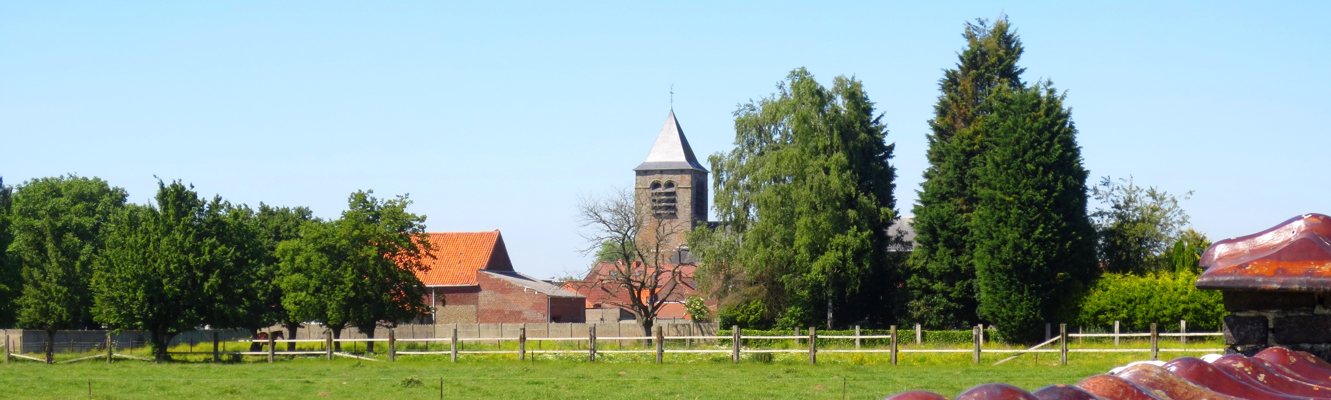 Bury-lez-Peruwelz